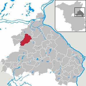 Höhenland in Brandenburg (Country) - District Märkisch-Oderland